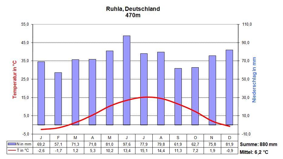 Klimadiagramm von Ruhla, monatliche Mittelwerte von 1961 bis 1990. Datenbasis für Temperaturen ist Wetterstation in Brotterode.